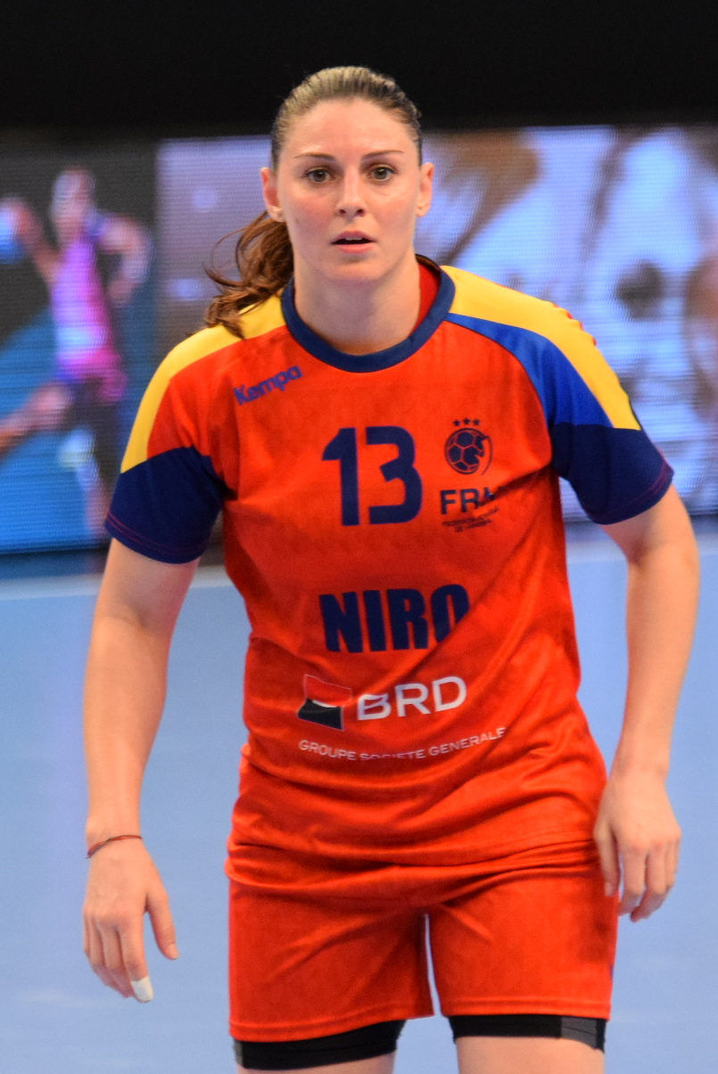 Luciana Marin Le 29 novembre 2015, lors du match Roumanie / Cuba pour le compte du TIPIFF 2015. Au stade Pierre de Coubertin à Paris.